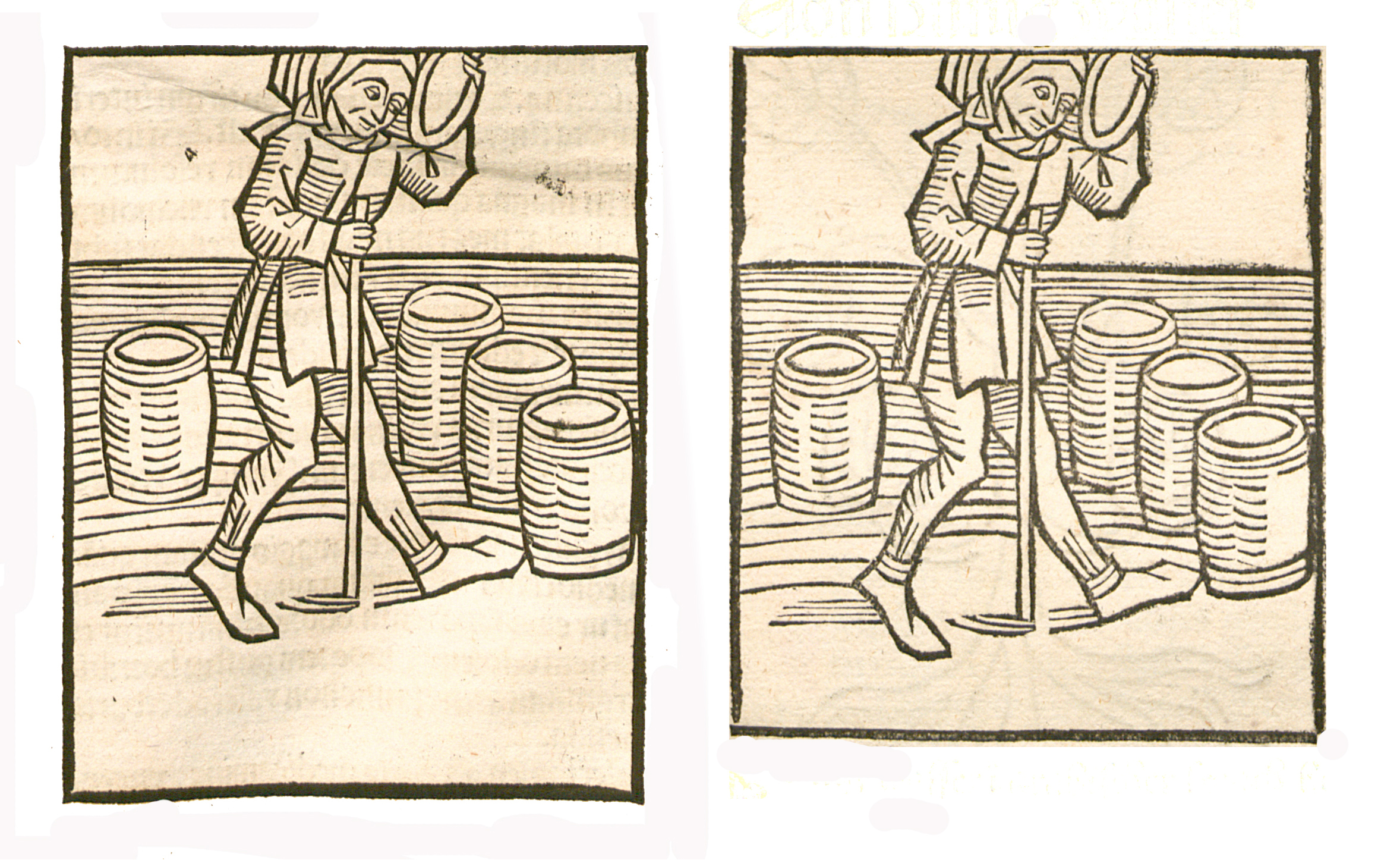 Abbildung von: Hunig (Mel)